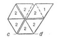 Флексагон